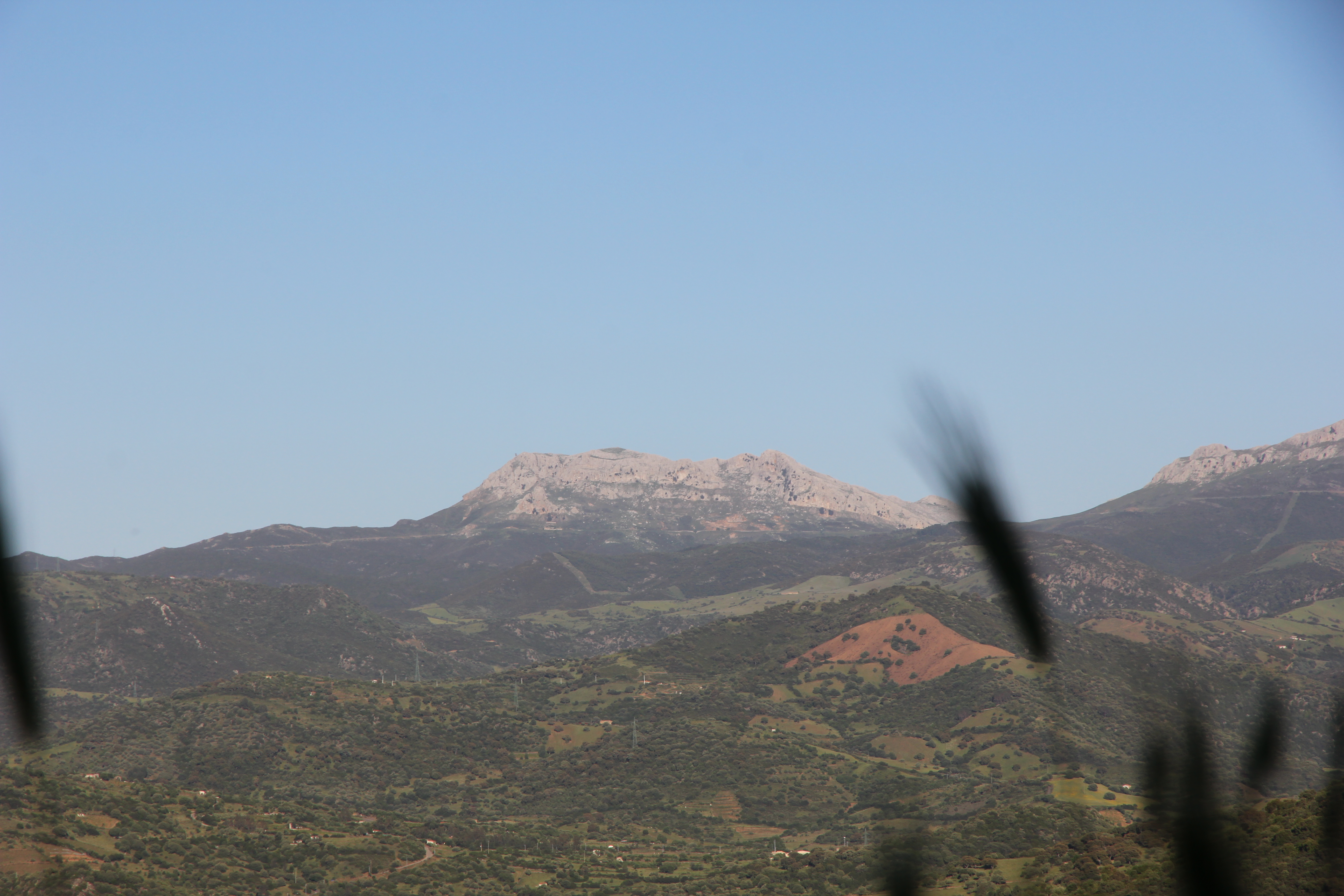 Lula, Siniscola - Catena del Montalbo